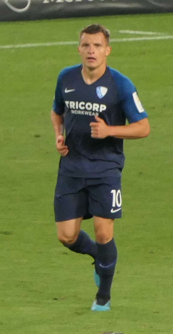 Der Fussballprofi Thomas Eisfeld im Trikot vom VfL Bochum beim Auswärtsspiel gegen den VfB Stuttgart am 02.09.2019.